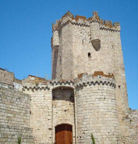 Castillo de Coria. El castillo visto desde la plaza de la Cava.